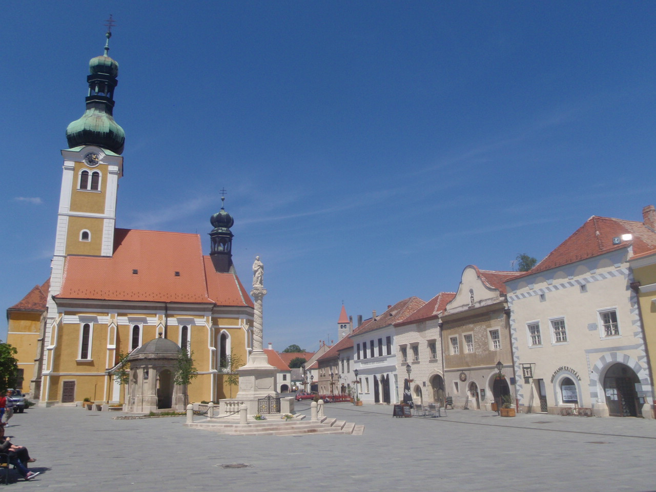 Kőszeg, Jurisics tér, felújítva 2011-ben